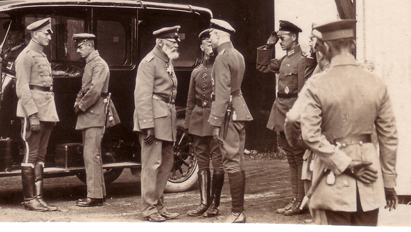 03. November 1916 König Ludwig III. von Bayern besucht die bayerische Feldflieger Abteilung 4 b in Kowel an der Ostfront. Der Abteilungsleiter Hauptmann Georg Haberl stellt dem König seine Flugzeugführer und Beobachter vor Der König ist im Gespräch mit einem Flugzeugführer.